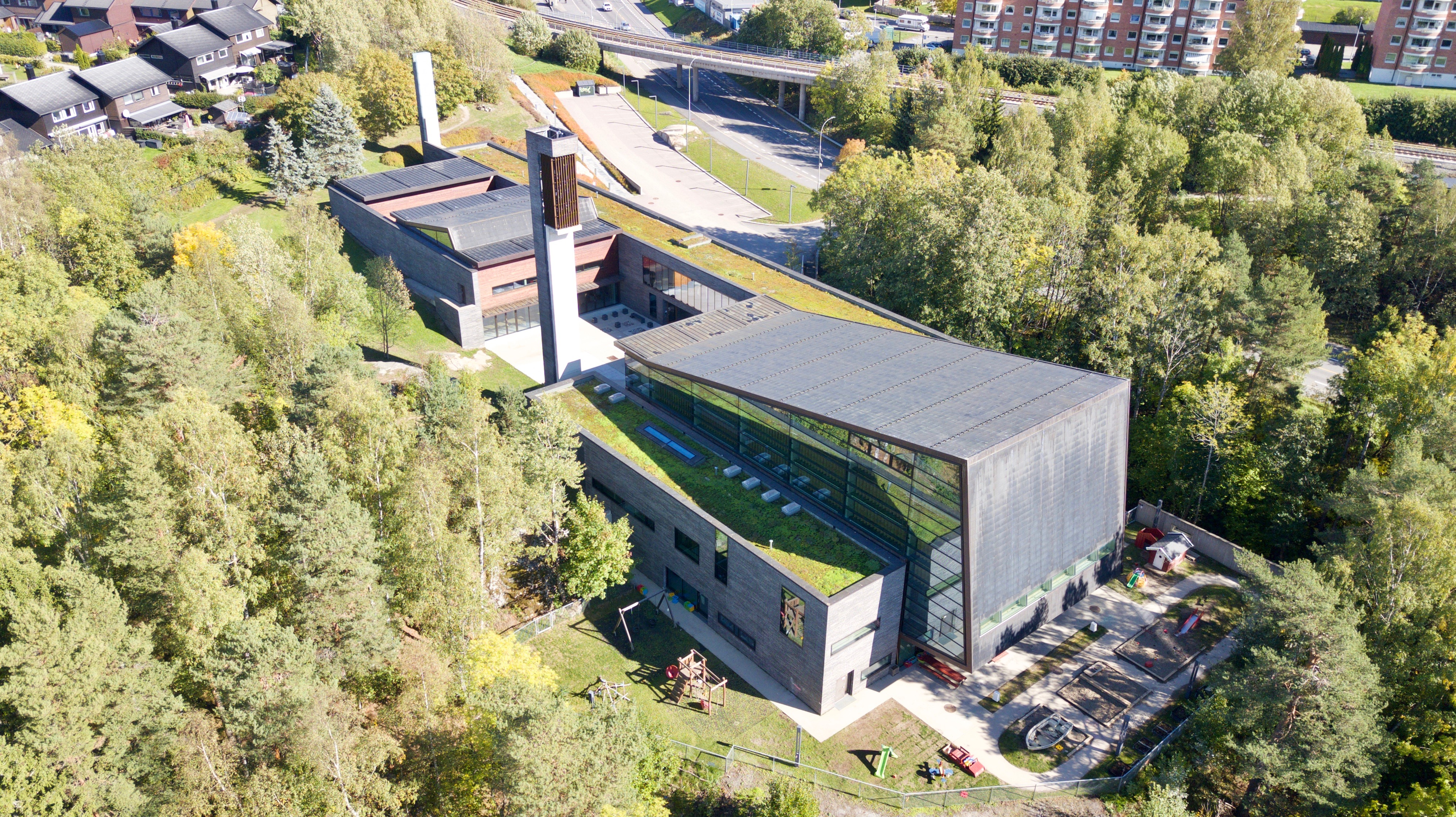 Bøler kirke. Bøler i Oslo.